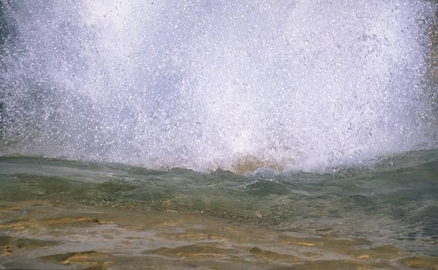 Ausbruch eines Geysirs (5/6) Forograf: Andreas Tille